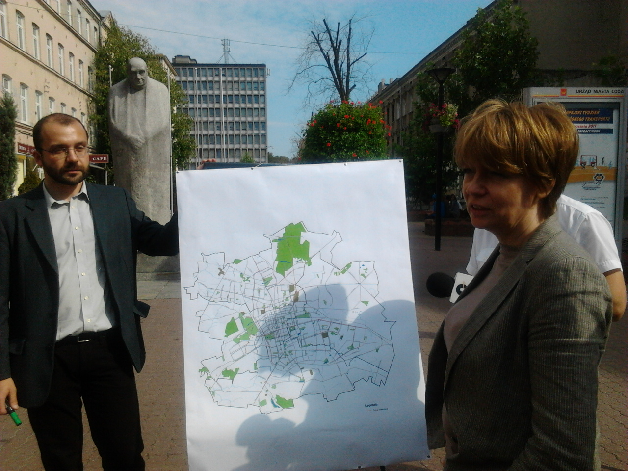 Prezydent Łodzi Hanna Zdanowska i Witold Kopeć pełnomocnik ds. polityki rowerowej podczas spotkania z mieszkańcami Łodzi w ramach Europejskiego Tygodnia Zrównoważonego Transportu, Łódź 2011 Unknown